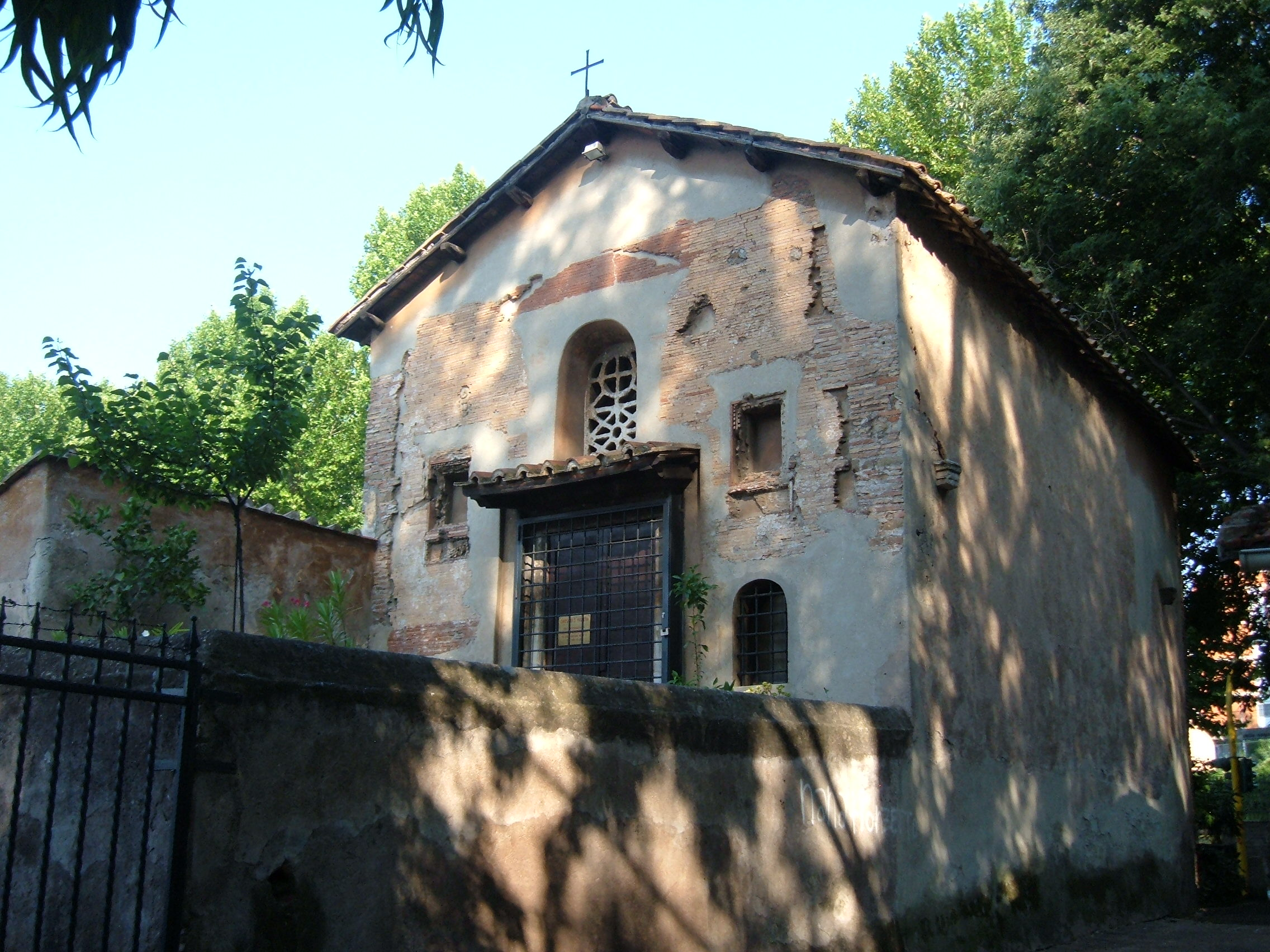 Chiesa di Santa Passera, a Roma, nel quartiere Portuense.